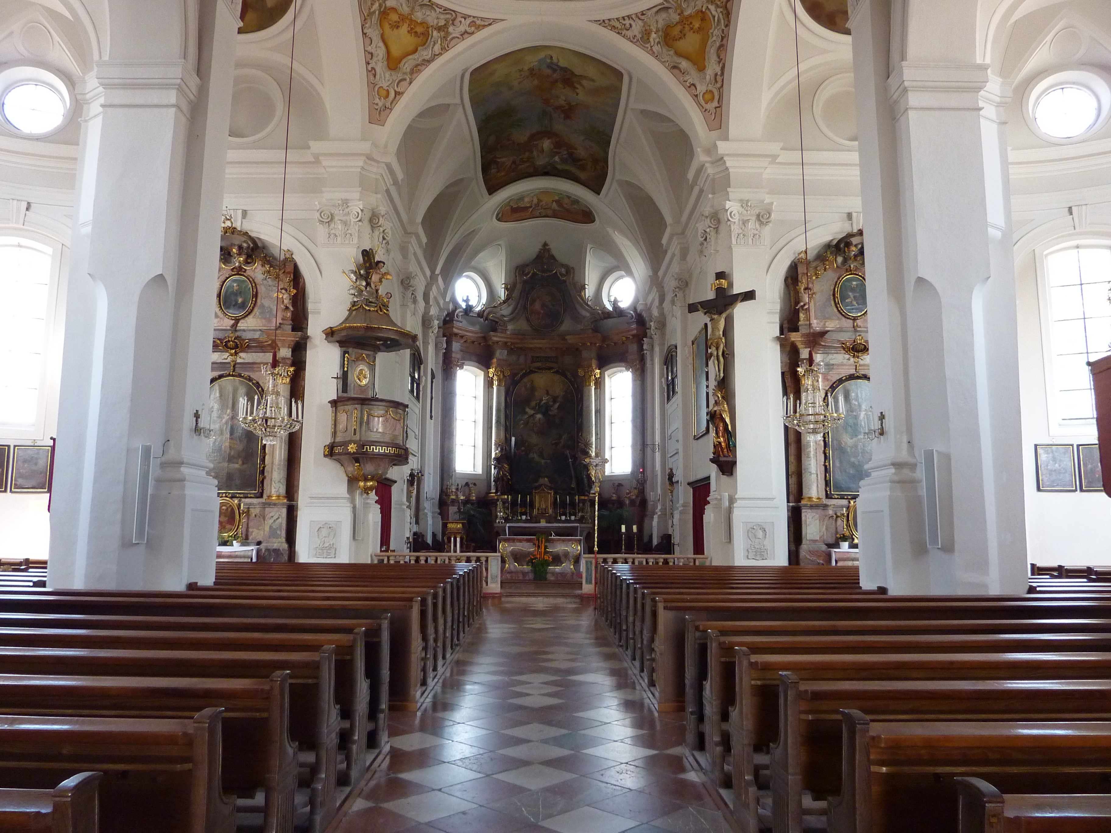 Pfarrkirche in Mattighofen in Oberösterreich